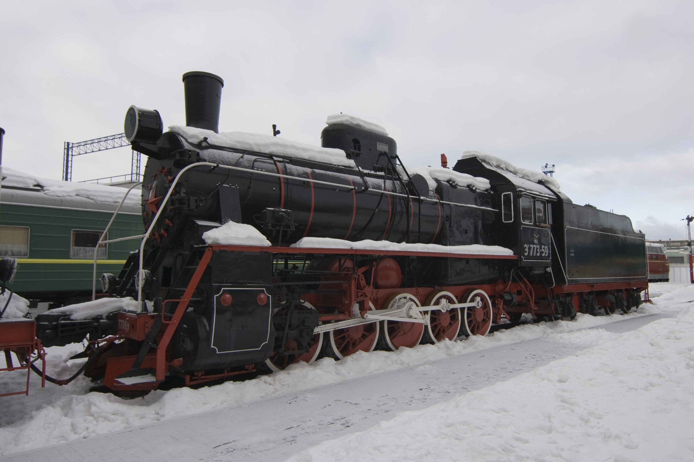 Паровоз Эр-773-59. Киевская выставка исторического подвижного состава